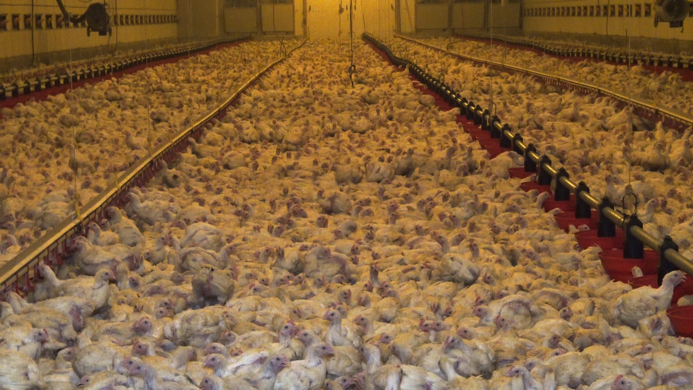 Poulets d'élevage intensif (enquête l214)